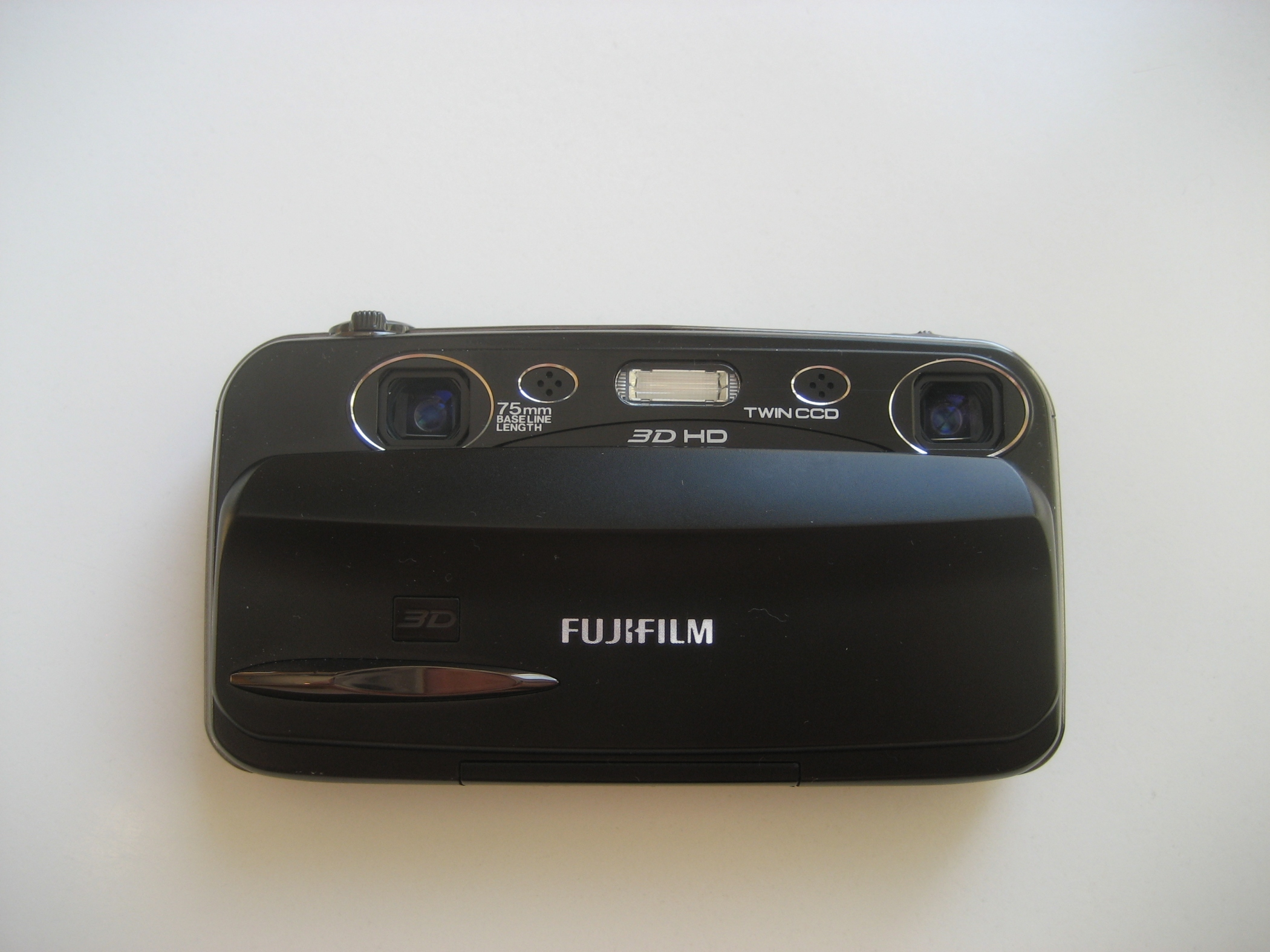 Fujifilm FinePix REAL 3D W3, digitaler Fotoapparat